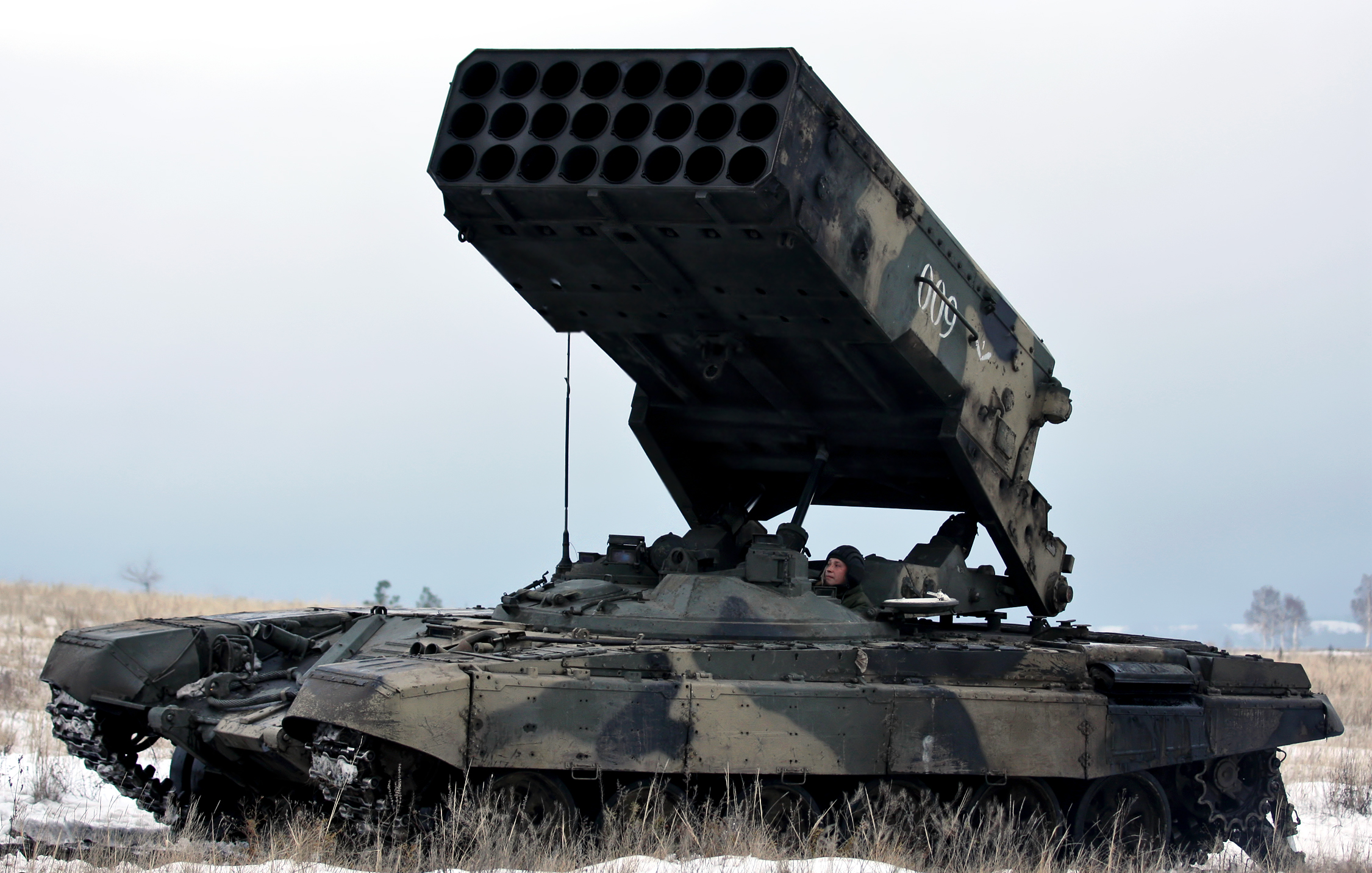 Боевая машина БМ-1 из состава тяжелой огнеметной системы залпового огня ТОС-1А (Combat vehicle BM-1 from TOS-1A heavy flamethrower system)